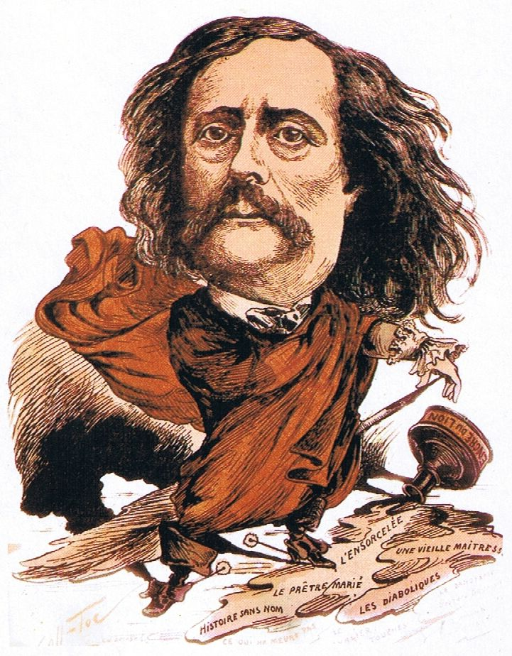 Portrait-charge de Jules Barbey d'Aurevilly (1808-1889)